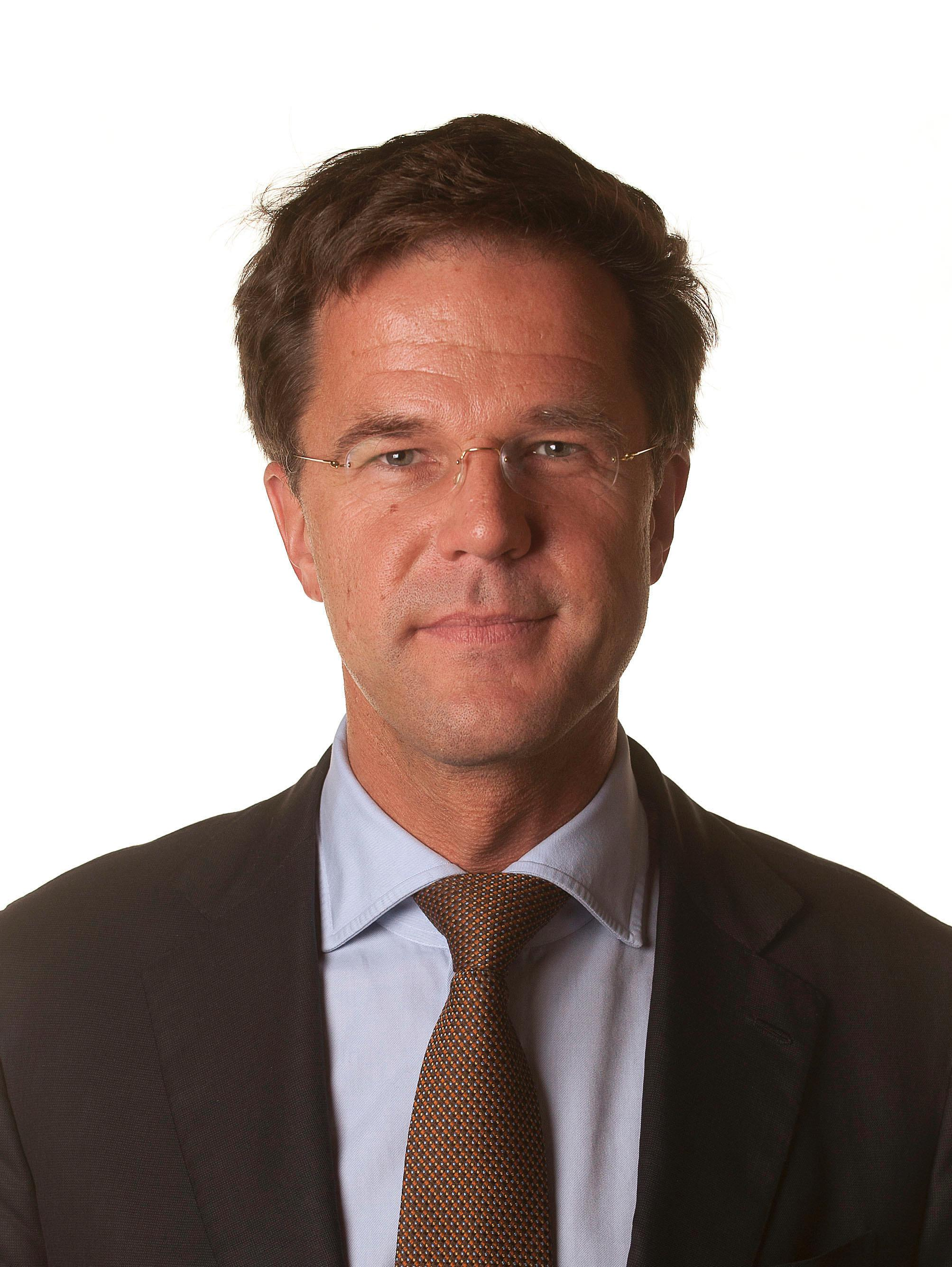 Nederlandse minister-president en minister van Algemene Zaken Mark Rutte